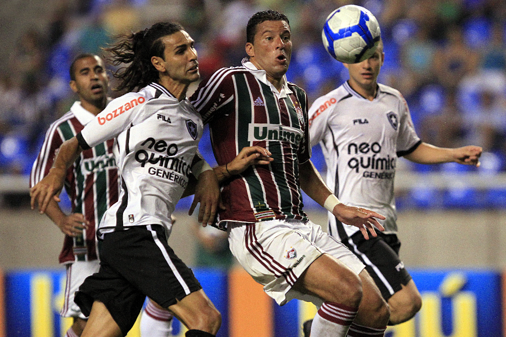 Leandro Guerreiro do Botafogo, disputa lance com Washington do Fluminense. Fluminense 0 x 0 Botafogo Brasileiro 2010